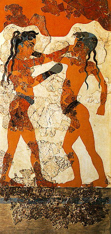 Fresque des enfants boxeurs. La fresque dépeint deux enfants nus portant une ceinture et des gants de boxe. Leur tête est rasée sauf pour deux longues mèches derrière, et deux plus courtes sur le front. Leur peau foncée indique leur sexe. Le garçon de gauche est le plus réservé des deux et porte des bijoux (bracelets, collier) qui indiquent un statut social plus élevé. Œuvre du même artiste que la fresque des Antilopes. Pièce B1, édifice B à Akrotiri.